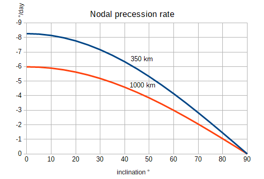 Nodal precession rate from inclinatio for altitude 350 and 1000 km.